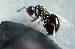 vespa nasonia